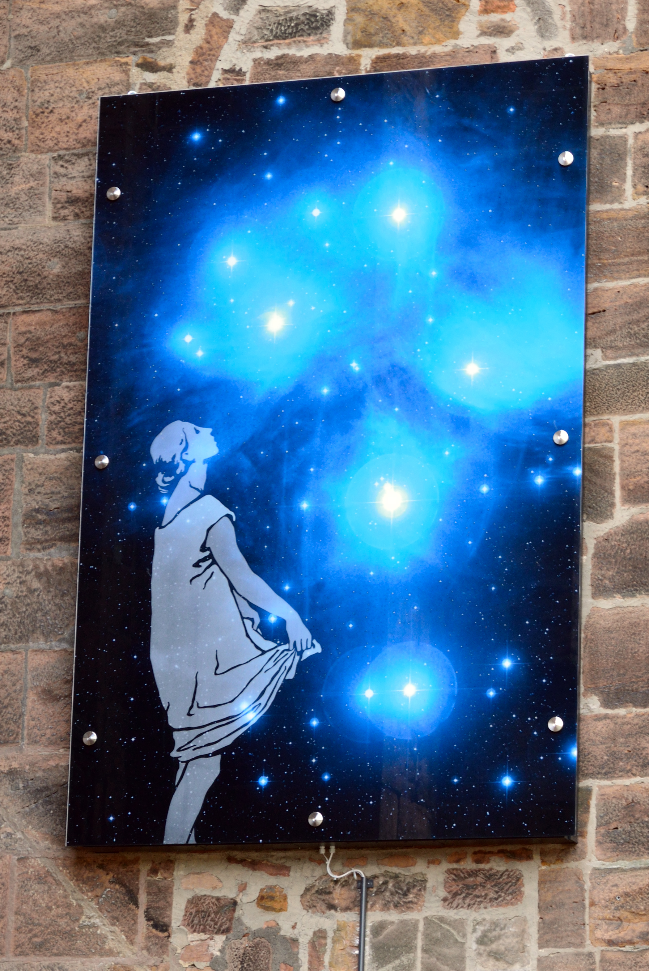 Lichtkunstwerk von Doris und Florian Conrads an der Marburger Universitätskirche: Sterntaler-​Illustration von Otto Ubbelohde, kombiniert mit einer Weltraum-​Fotografie